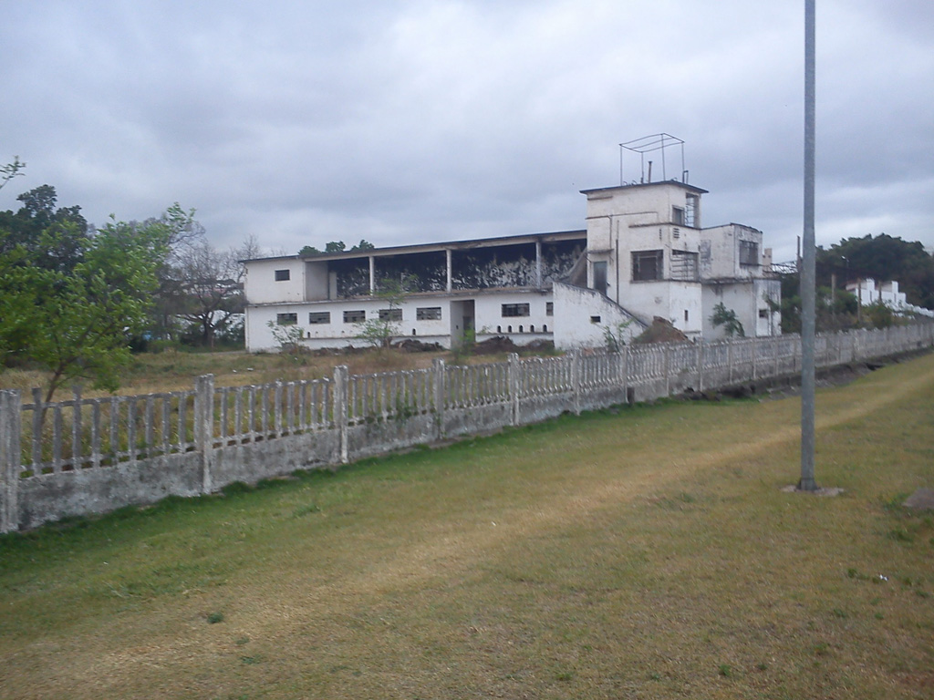 Torres e arquibancadas da Sociedade Paulista de Trote, em 2011.